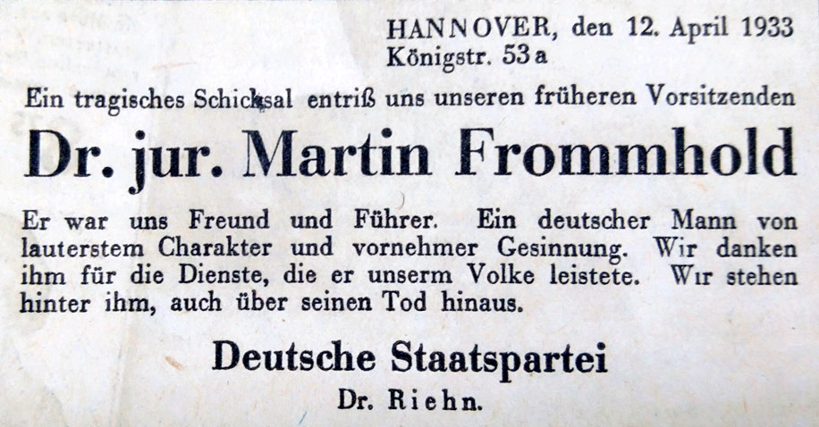 In der Tageszeitung Hannoverscher Anzeiger abgedruckte Traueranzeige der Deutschen Staatspartei, vertreten durch den Mediziner, Kinderarzt und Kommunalpolitiker Wilhelm Riehn, unter der Adresse Königstr. 53a in Hannover datiert 12. April 1933 mit dem Text „Ein tragisches Schicksal entriß uns unseren früheren Vorsitzenden Dr. jur. Martin Frommhold Er war uns Freund und Führer. Ein deutscher Mann von lauterstem Charakter und vornehmer Gesinnung. Wir danken ihm für die Dienste, die er unserem Volk leistete. Wir stehen hinter ihm, auch über seinen Tod hinaus.“